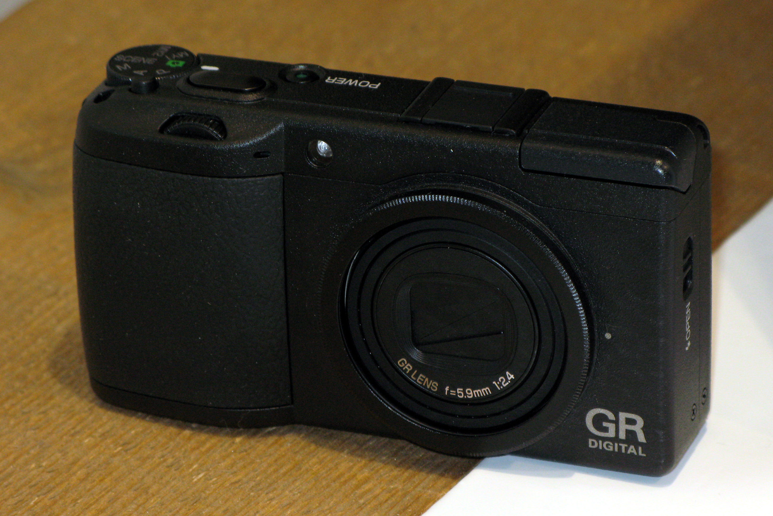 Ricoh GR Digital II